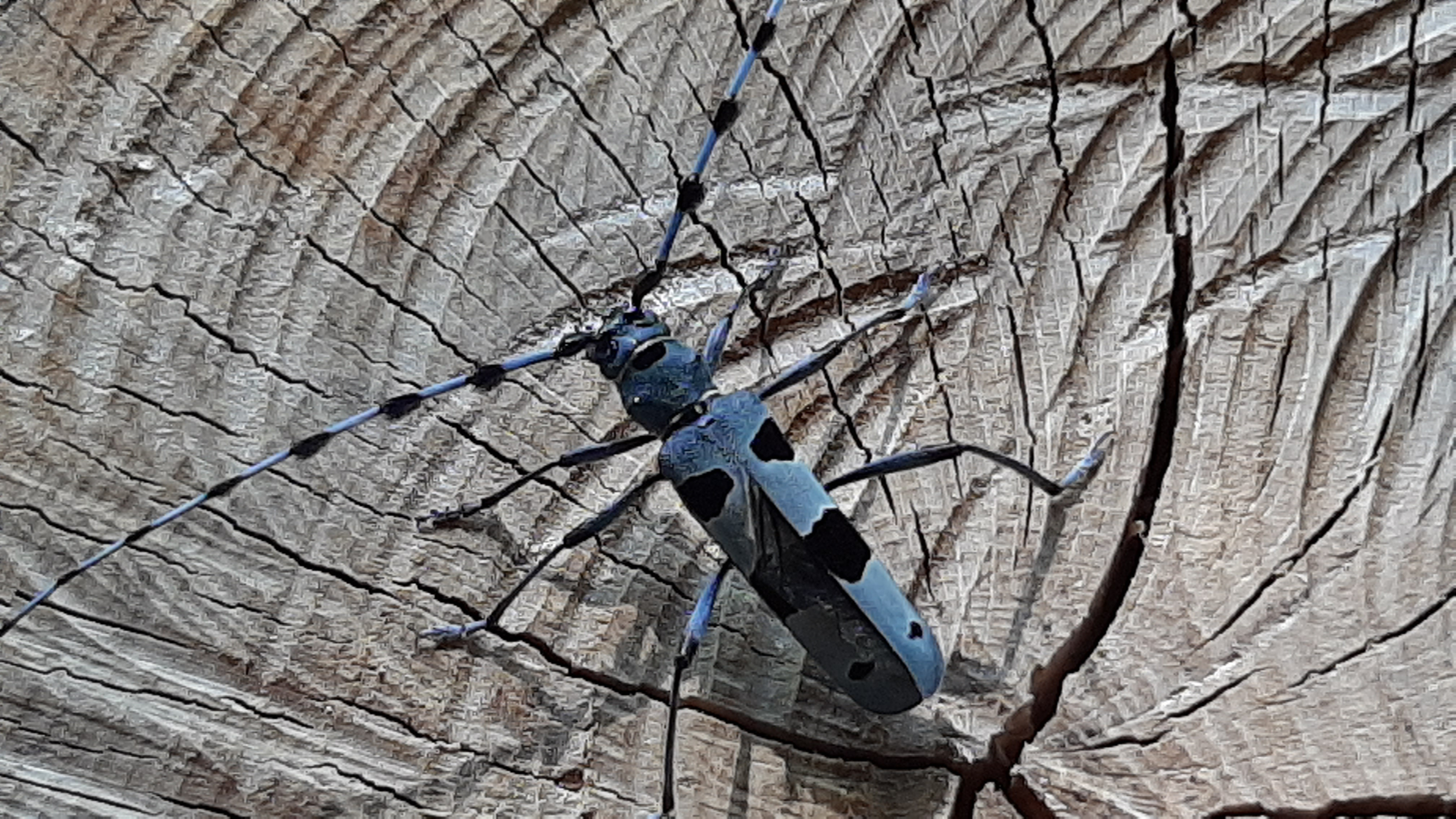 Rosalia alpina sobre un tocón cortado de haya. Valle de Ocón. La Rioja.